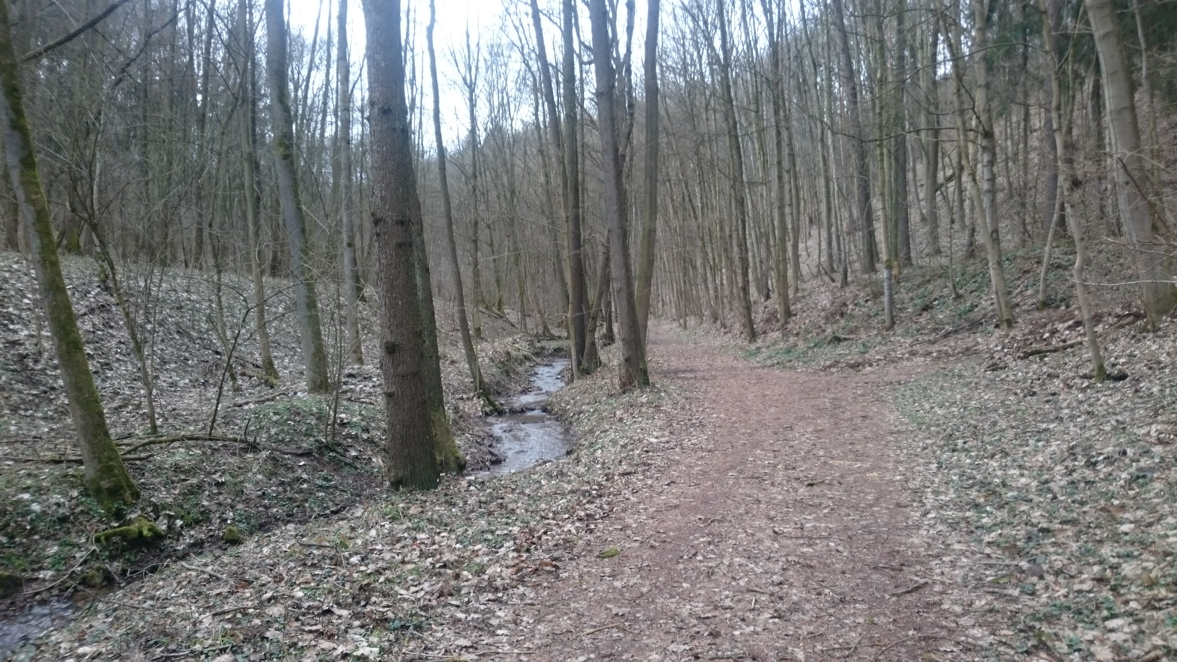 Im Naturschutzgebiet "Seußlitzer und Gauernitzer Gründe", hier im Eichhörnchengrund